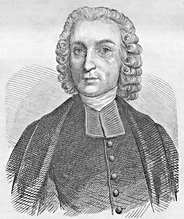 Hatvani István (1718–1786) orvosdoktor, a Debreceni Kollégium tanára (Vasárnapi Ujság, 1871. február 5.)